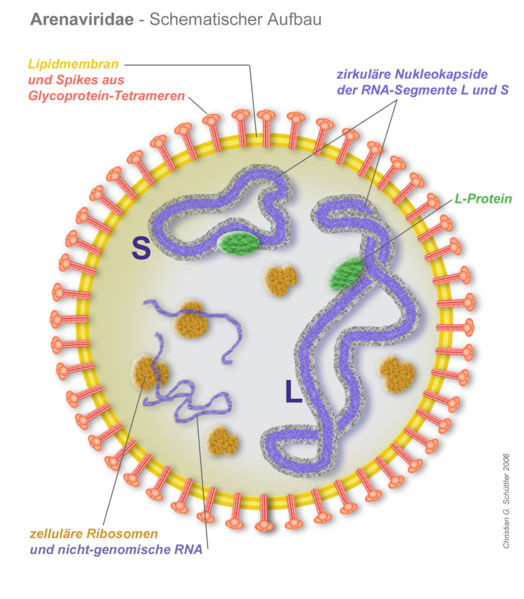 Schematischer Aufbau eines Arenavirus